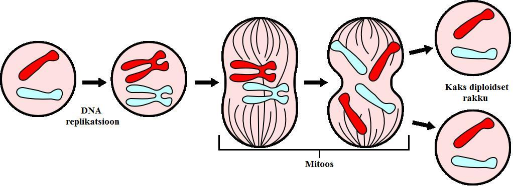 Mitoos